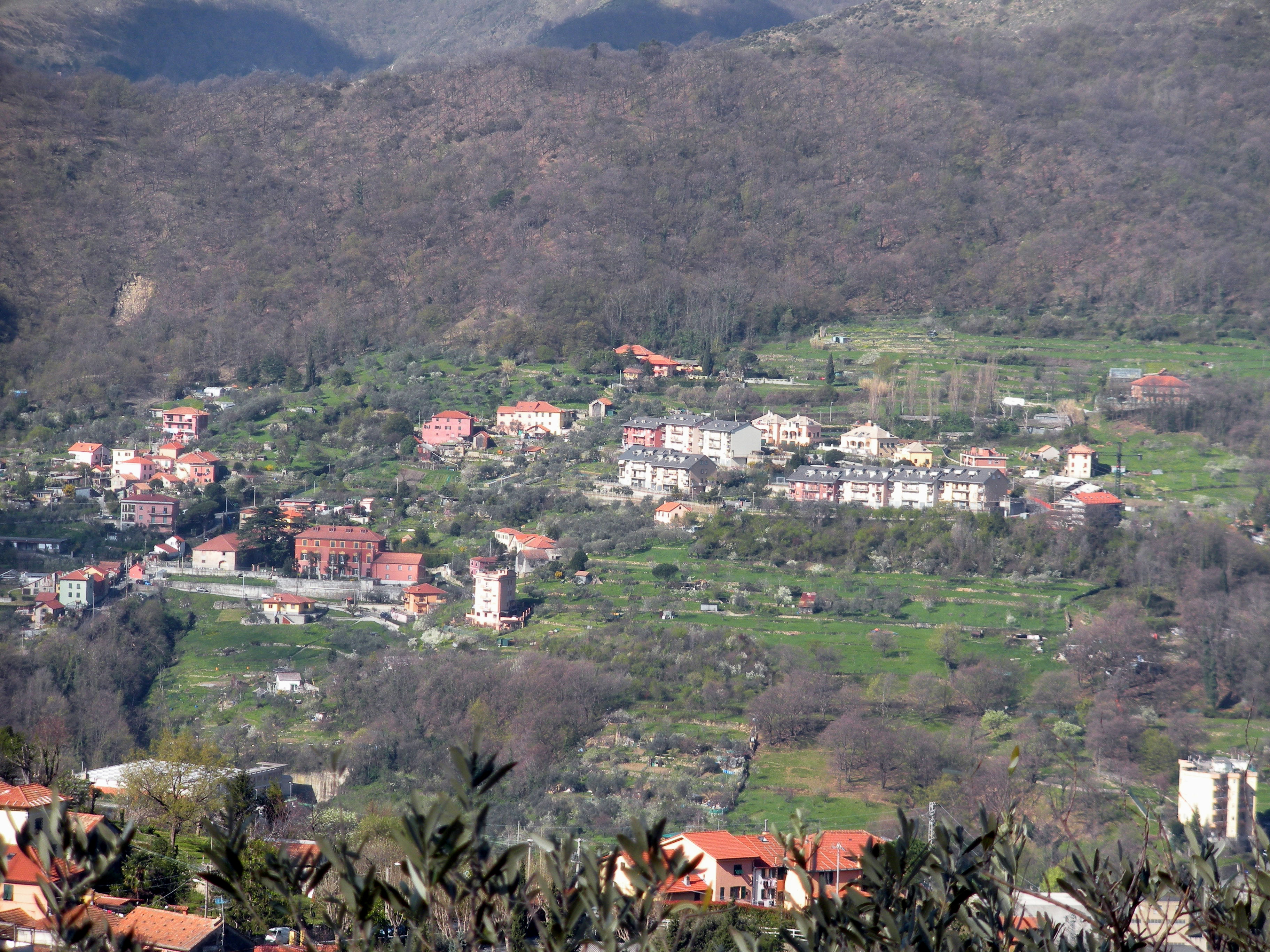 Panorama di Pino Sottano (Molassana, quartiere di Genova)